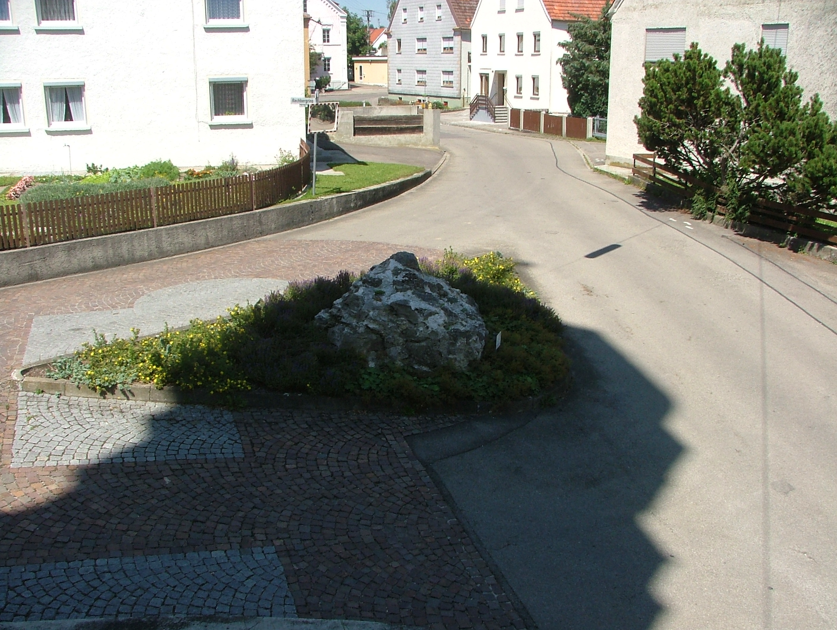 Kellmünz